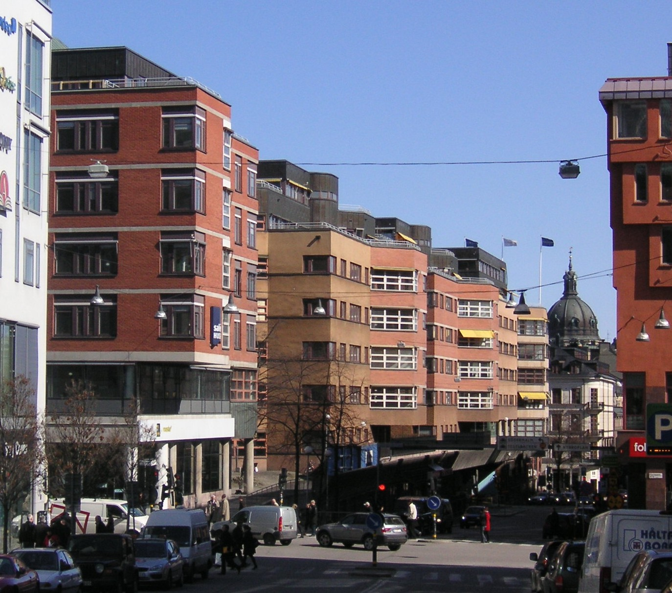 Mäster Samuelsgatan i Stockholm 2008